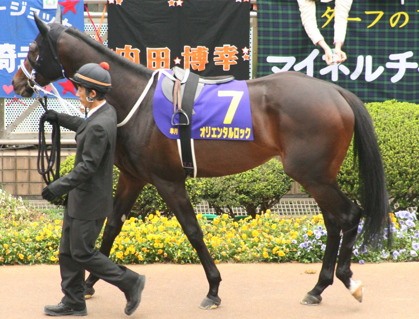 オリエンタルロック（中山競馬場 第68回皐月賞）